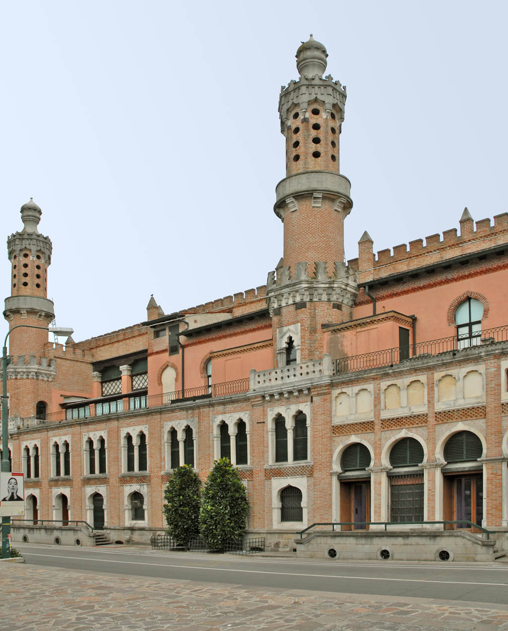 De style néo-mauresque, le grand hôtel Excelsior a ouvert ses portes en 1908.